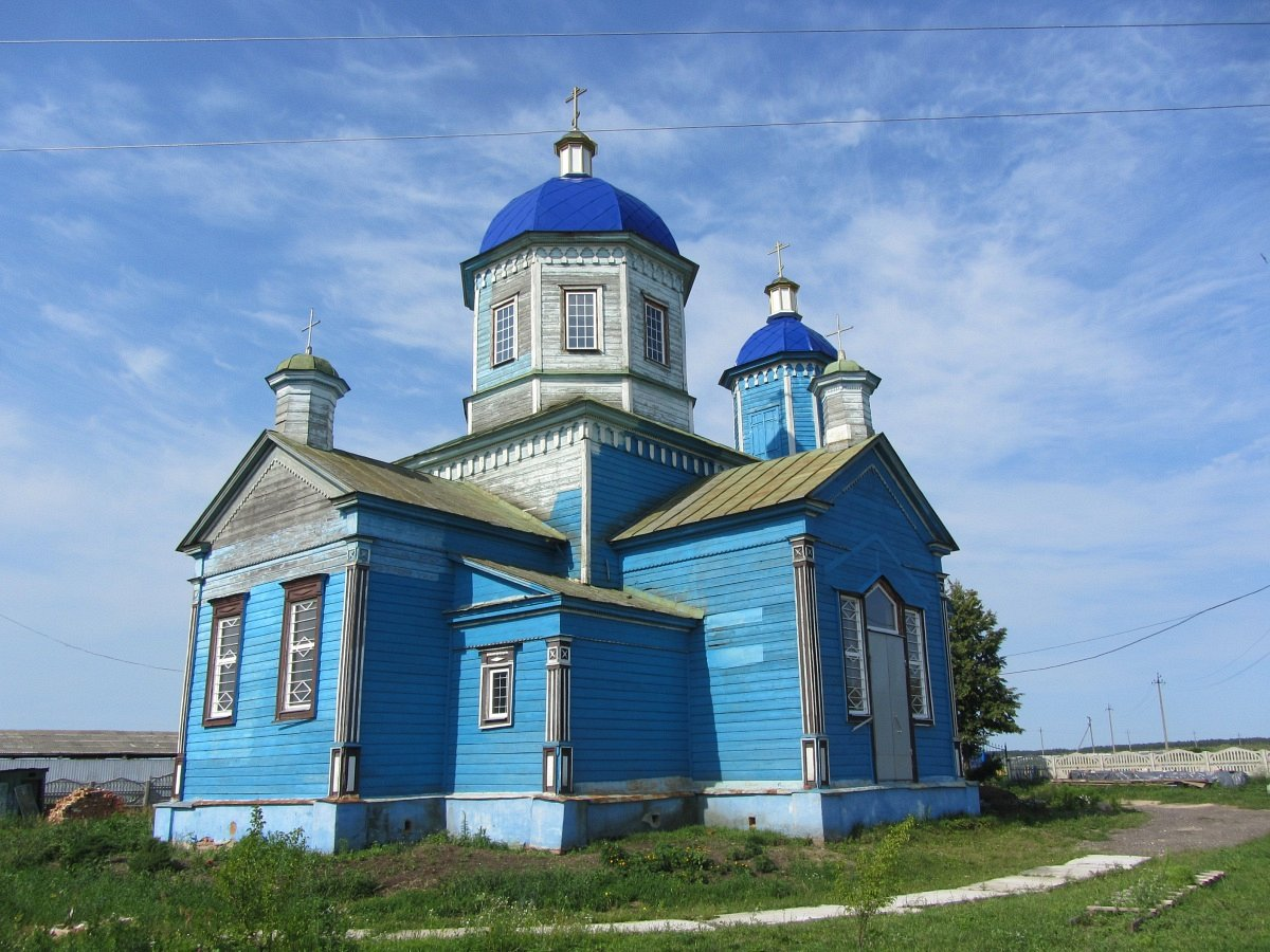 Глыбоцкае. Свята-Раства-Багародзіцкая царква